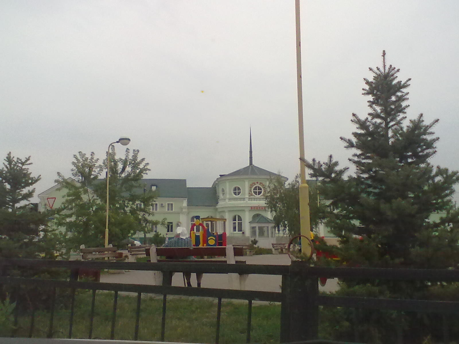 Вокзал города Фролово